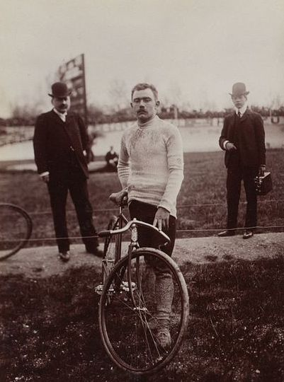 [Collection Jules Beau. Photographie sportive] : T. 21. Année 1903 / Jules Beau : F. 18. [Bordeaux - Paris, organisé par le Vélo, Buffalo, 10 mai 1903]